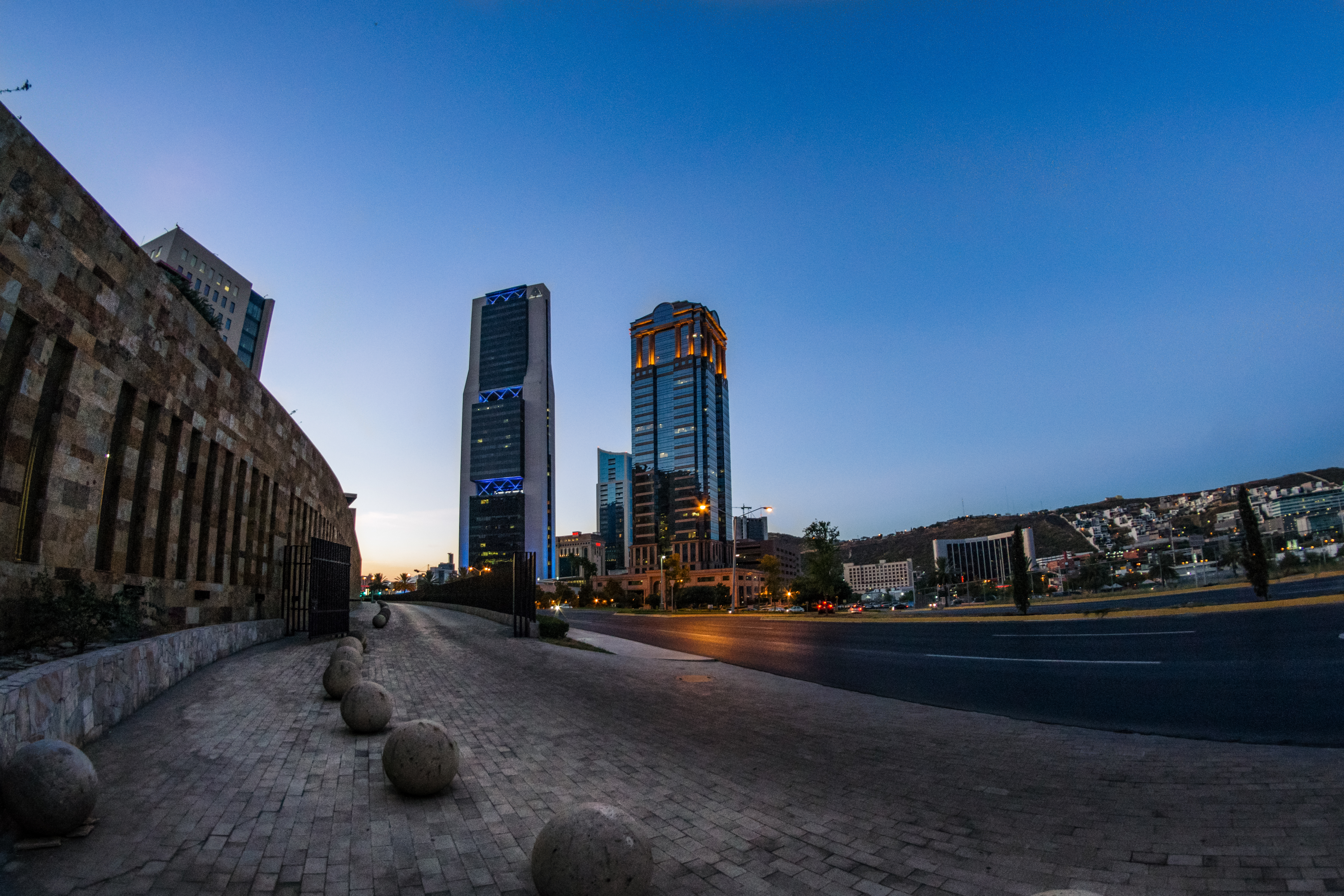 Valle Oriente.